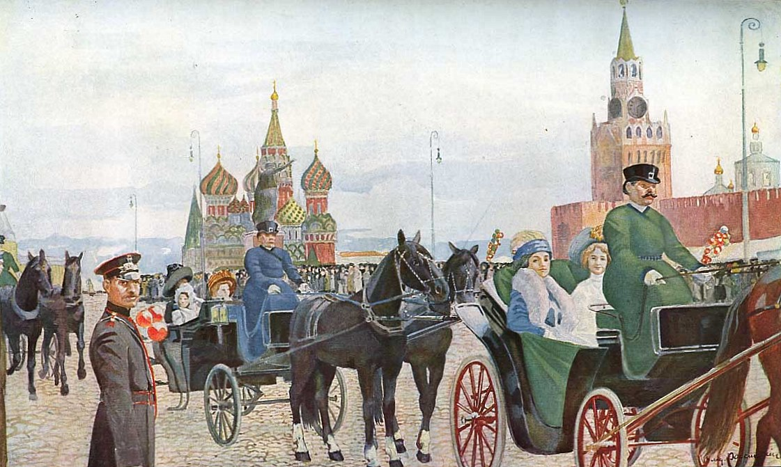 Катание в Вербное воскресенье на Красной площади. В. Россинский.